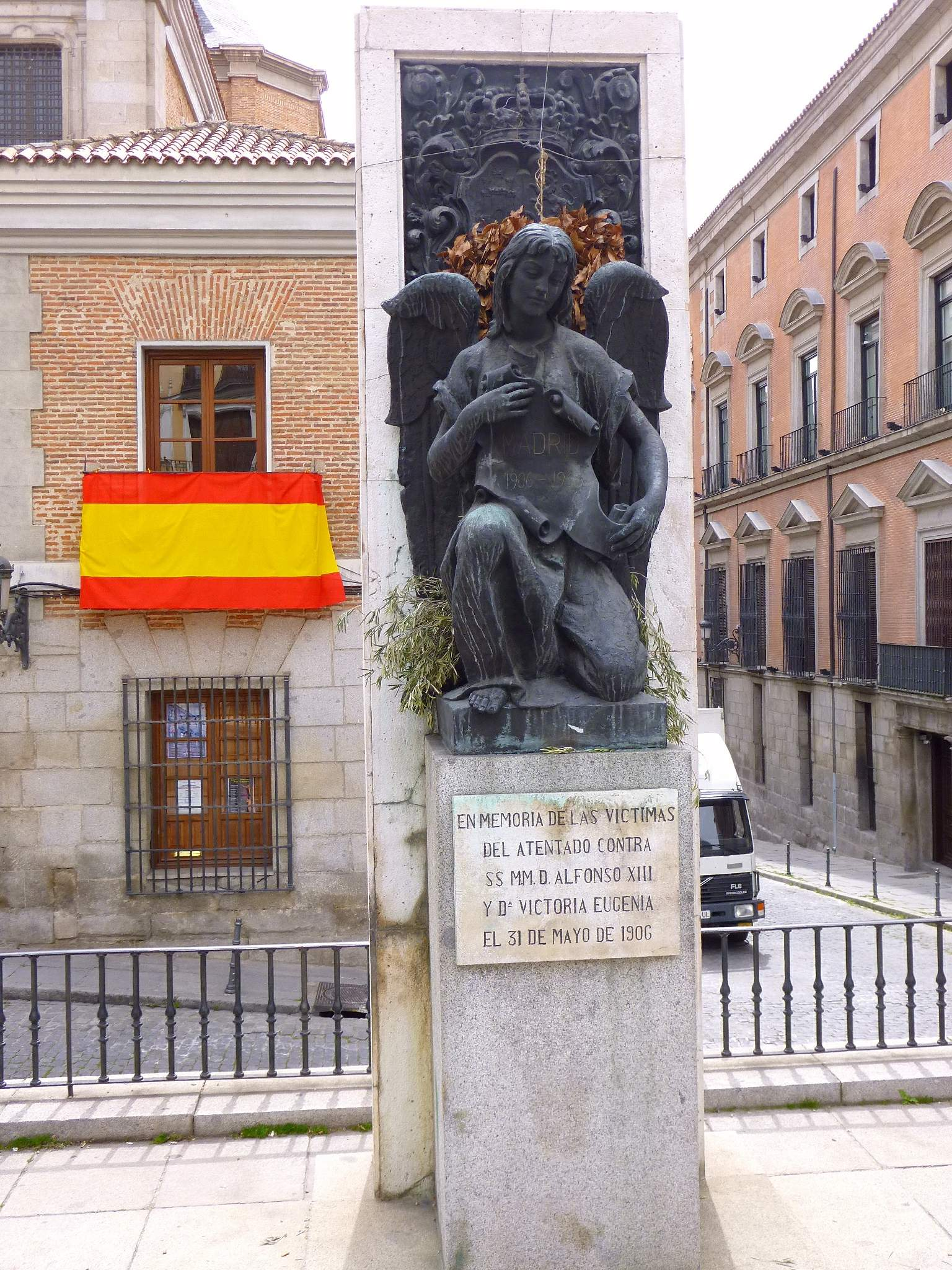 Memorial de las víctimas del atentado contra Alfonso XIII (1906), en Madrid